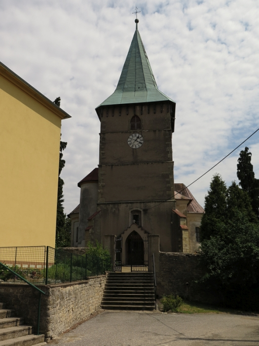 Kostel svatého Jakuba Většího, České Heřmanice.